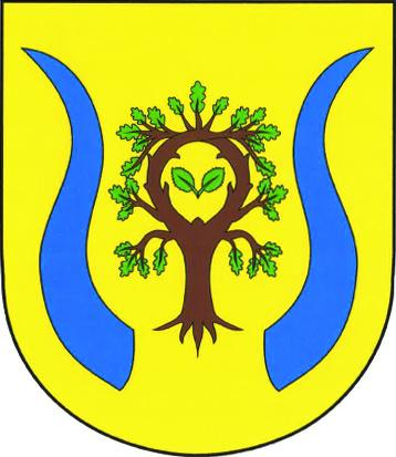 Znak obce Dománovice